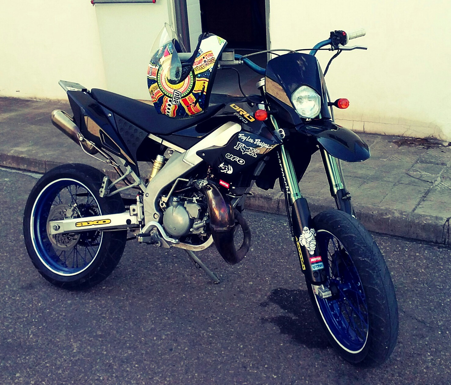 Derbi DRD PRO SM